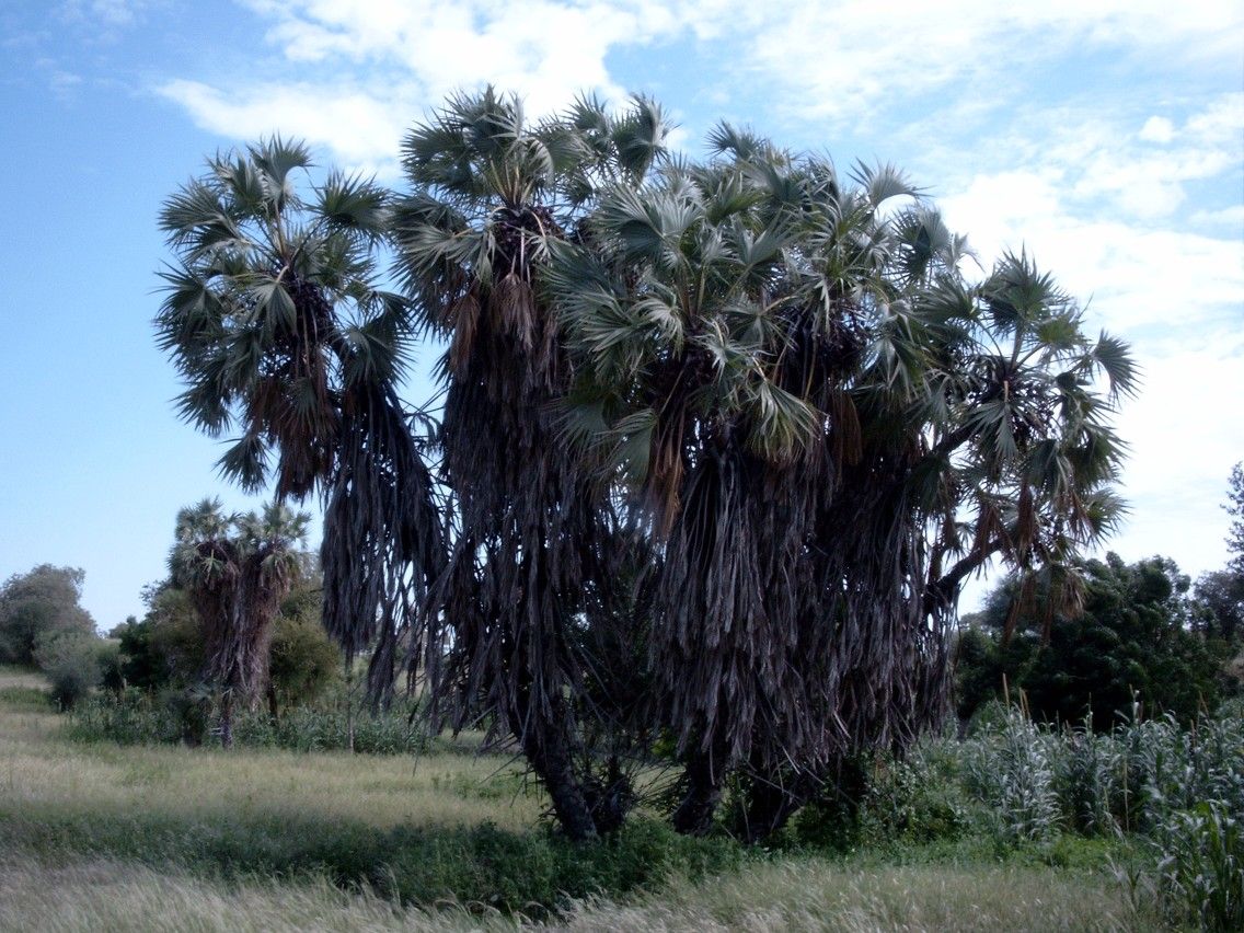 Hyphaene thebaica. Dune near Saouga, Oudalan, Burkina Faso.